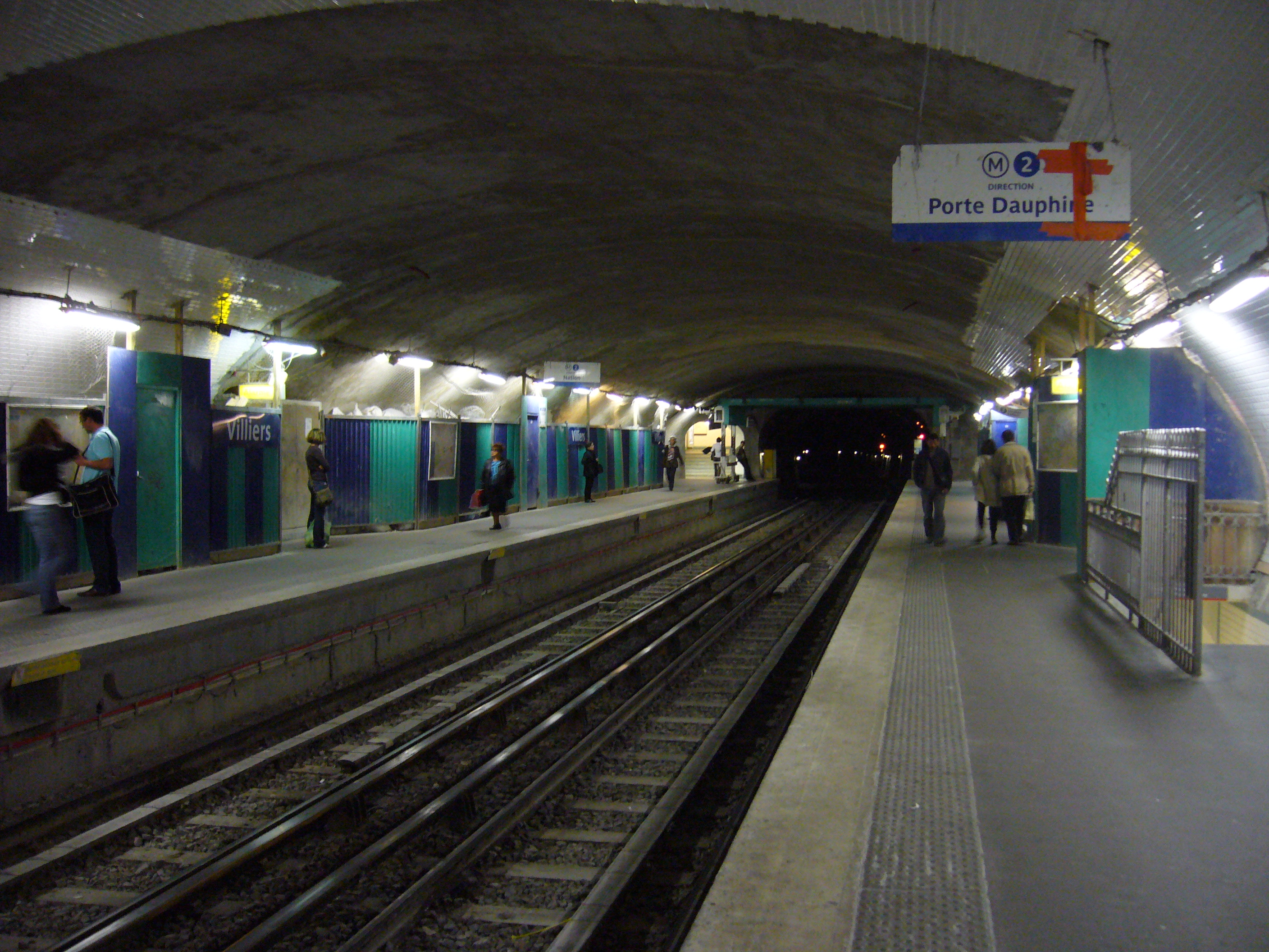 Quais en travaux de la station Villiers de la ligne 2 du métro de Paris.